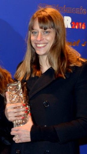 Alice Winocour à la cérémonie des César du cinéma